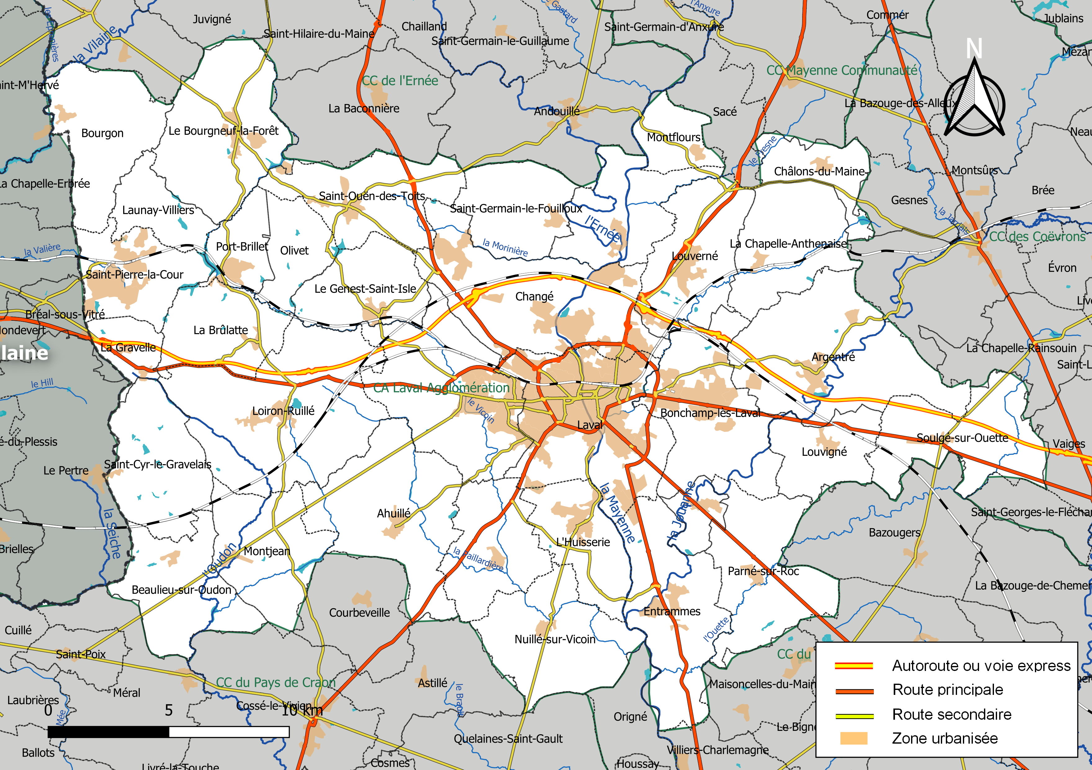 Carte géographique de l'intercommunalité Laval Agglomération, département de la Mayenne, France. Composition au 1er janvier 2019.